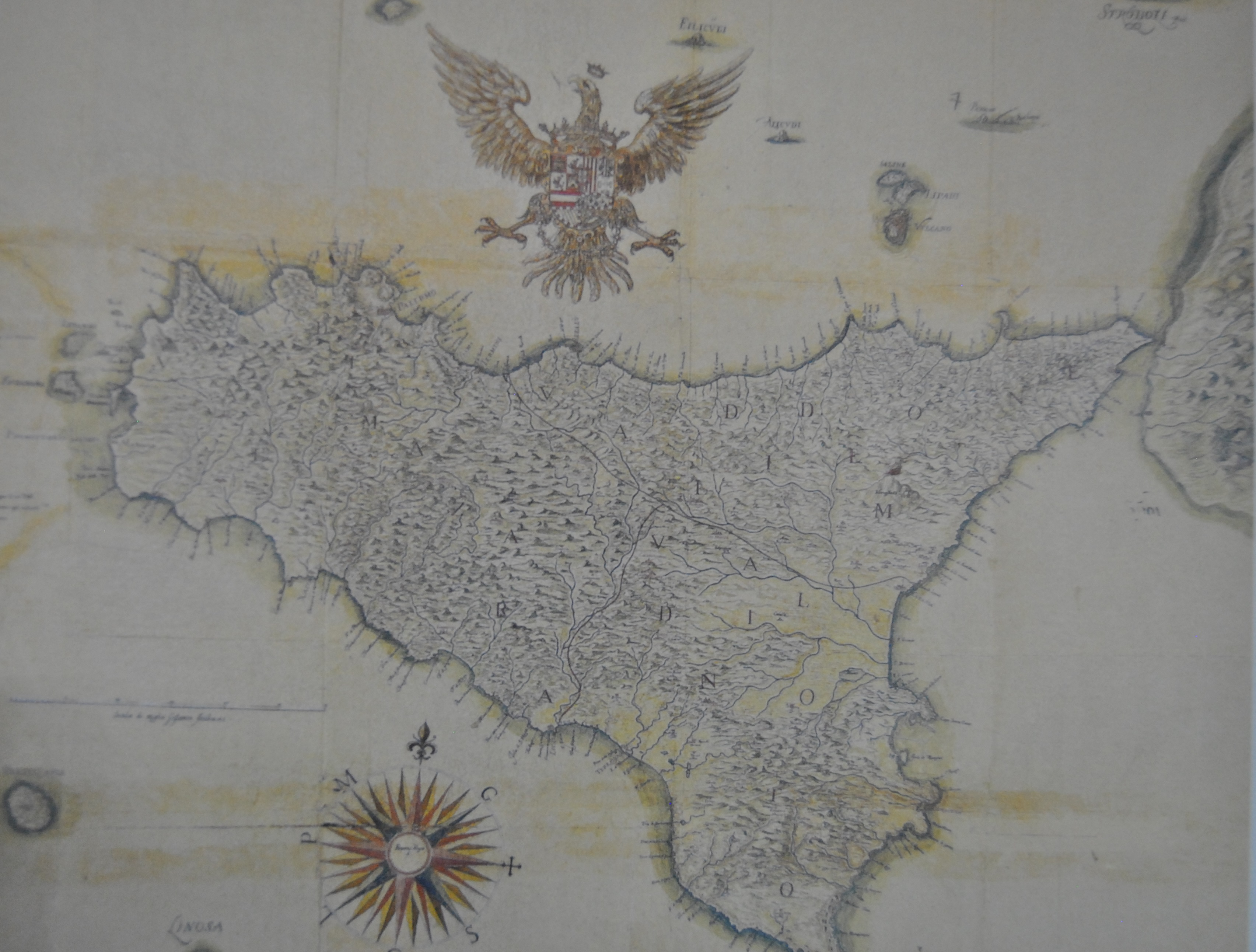 Felipe Nigro, Planta de todas las plaças y fortaleças del Reyno de Sicilia, sacadas de orden de su Magestad el Rey Philippo Quarto, ms. 1637 (BNM, ms. 1, olim 92 bis), in Liliane Dufour, Antonio La Gumina, Imago Siciliae, Sanfilippo editore (collana Grandi opere), Catania 1998.